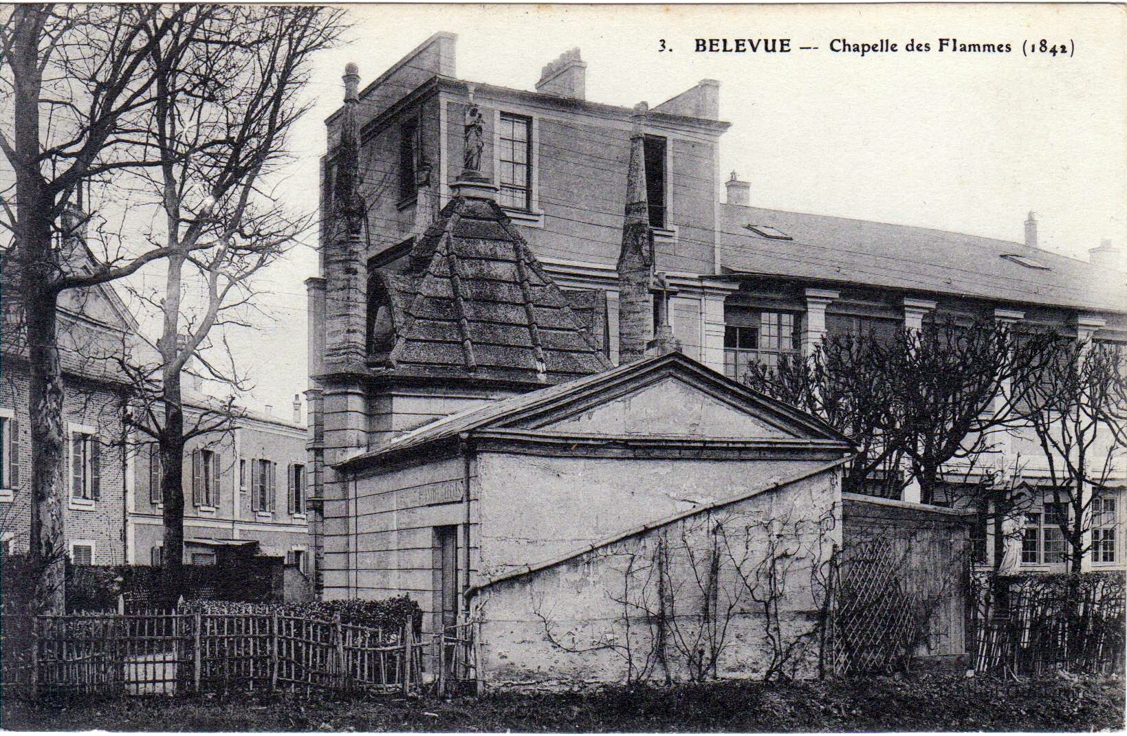 Chapelle Notre-Dames des Flammes à Meudon (circa 1910).